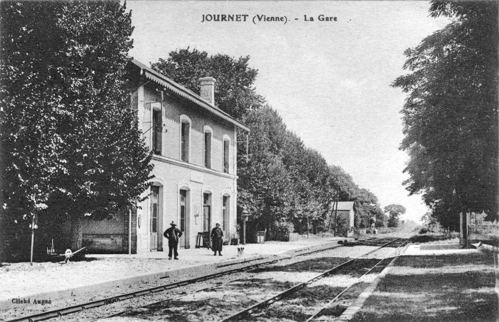 Intérieur de la gare avec quais et voies.